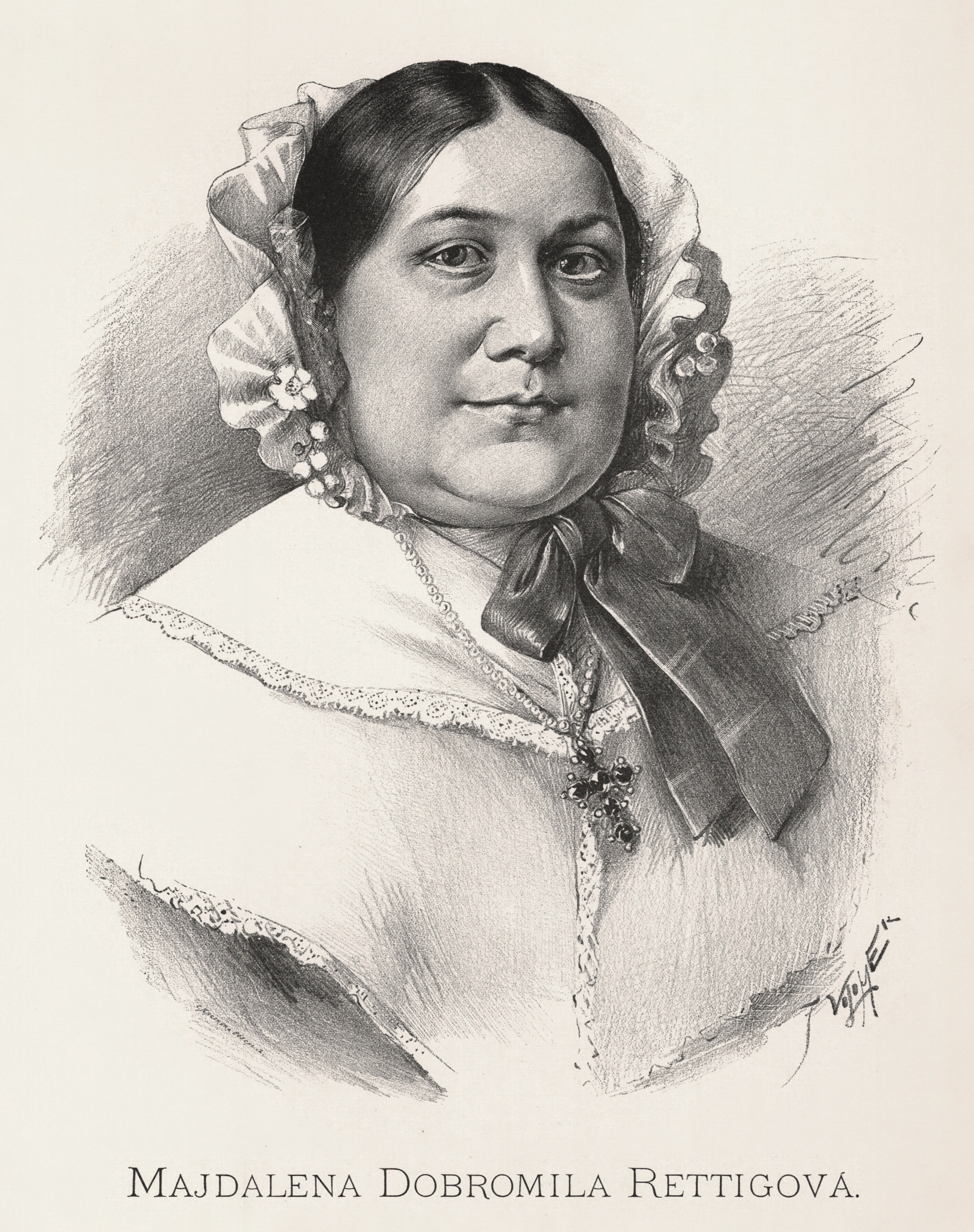 Portréty předních osobností od Jana Vilímka